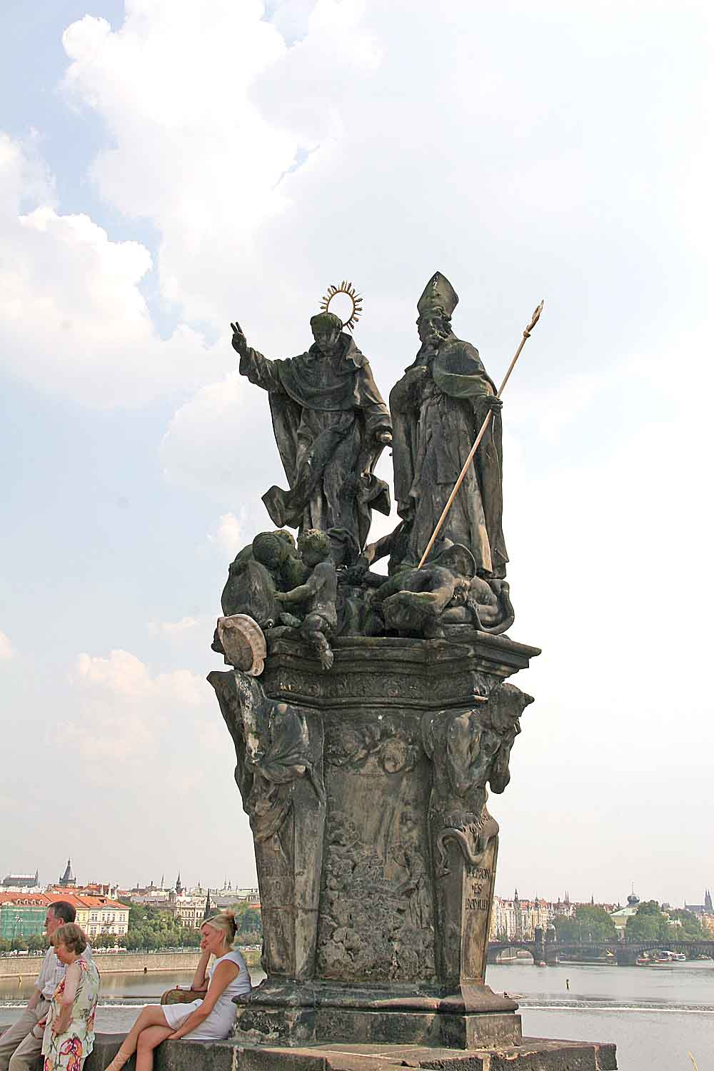 Česky: Sousoší Svatého Vincence Ferrerského a sv. Prokopa na Karlově mostě